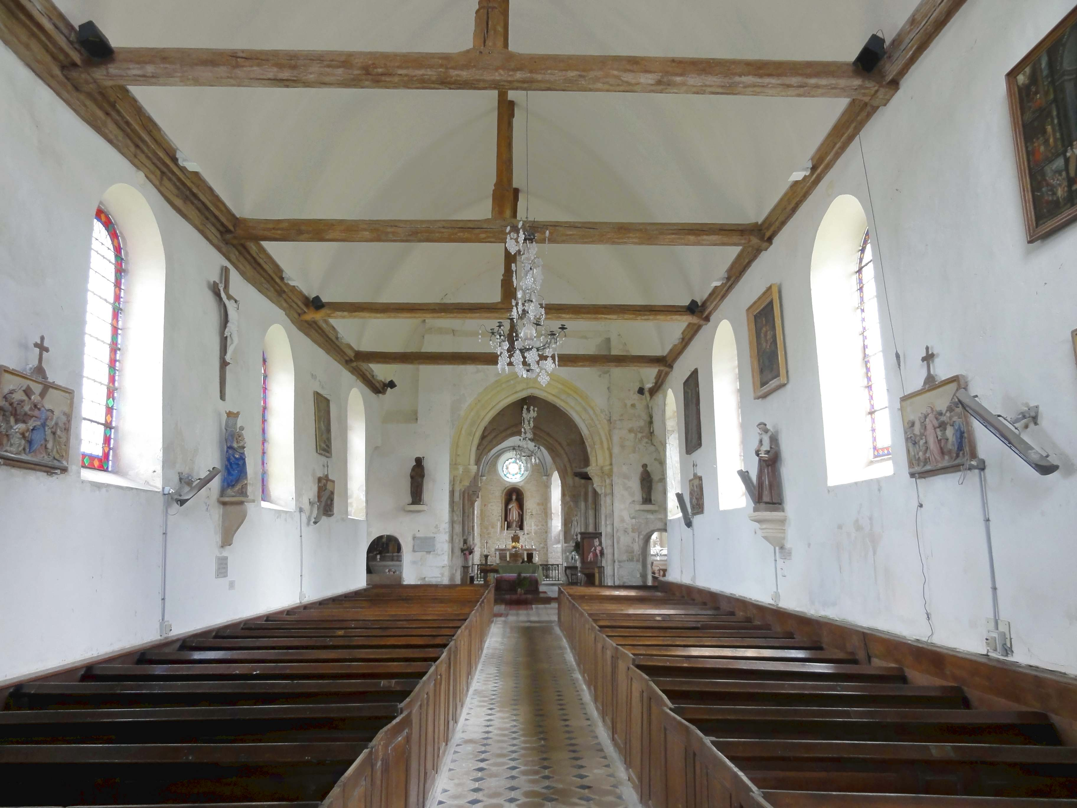 Intérieur de l'église - voir titre.